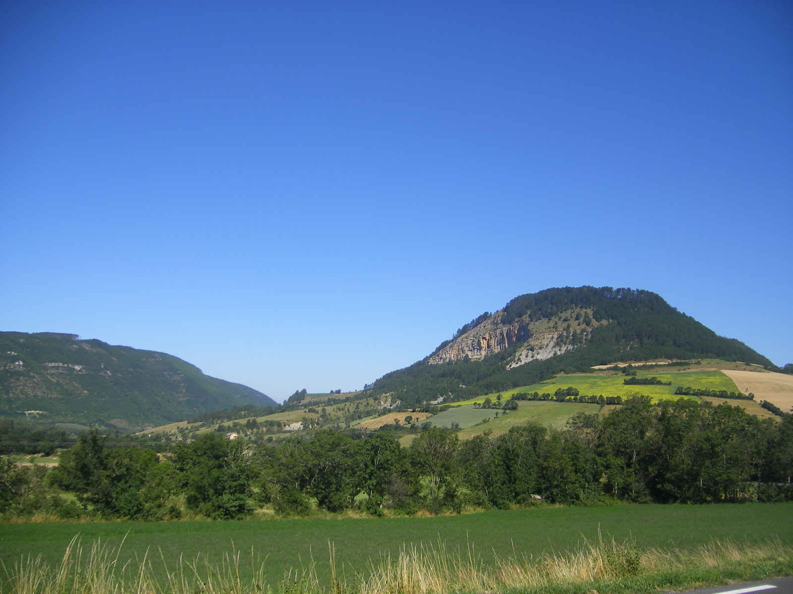 Truc de Balduc (1104 m) between Ste-Etienne-du-Valdonnez and Balsieges